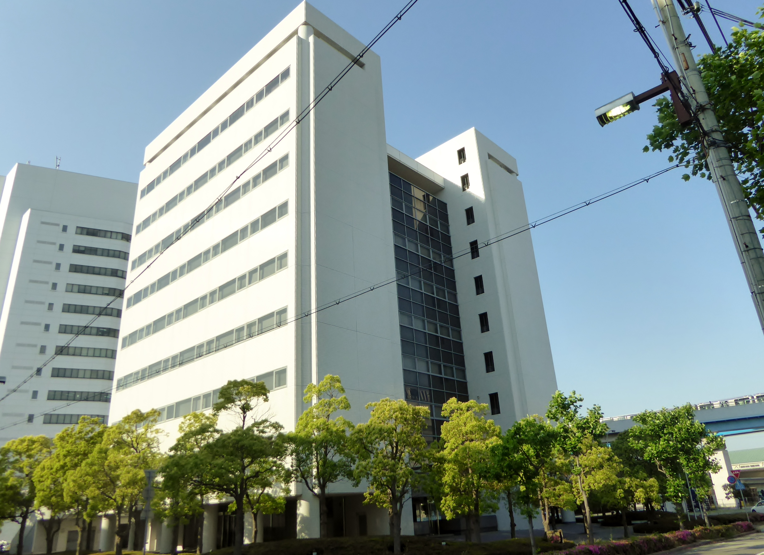 コナミ神戸ビルを撮影。